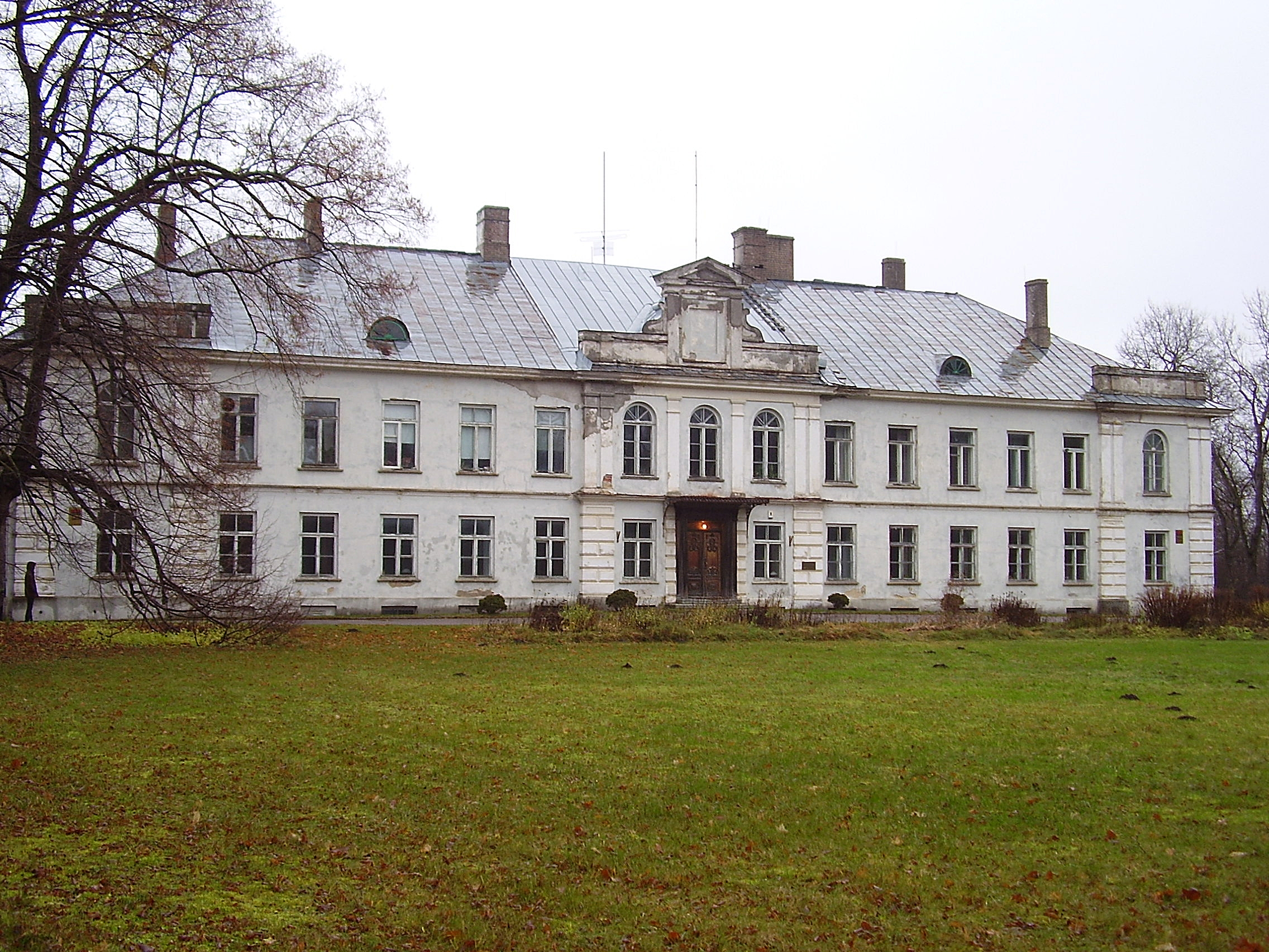 Harku mõisa peahoone